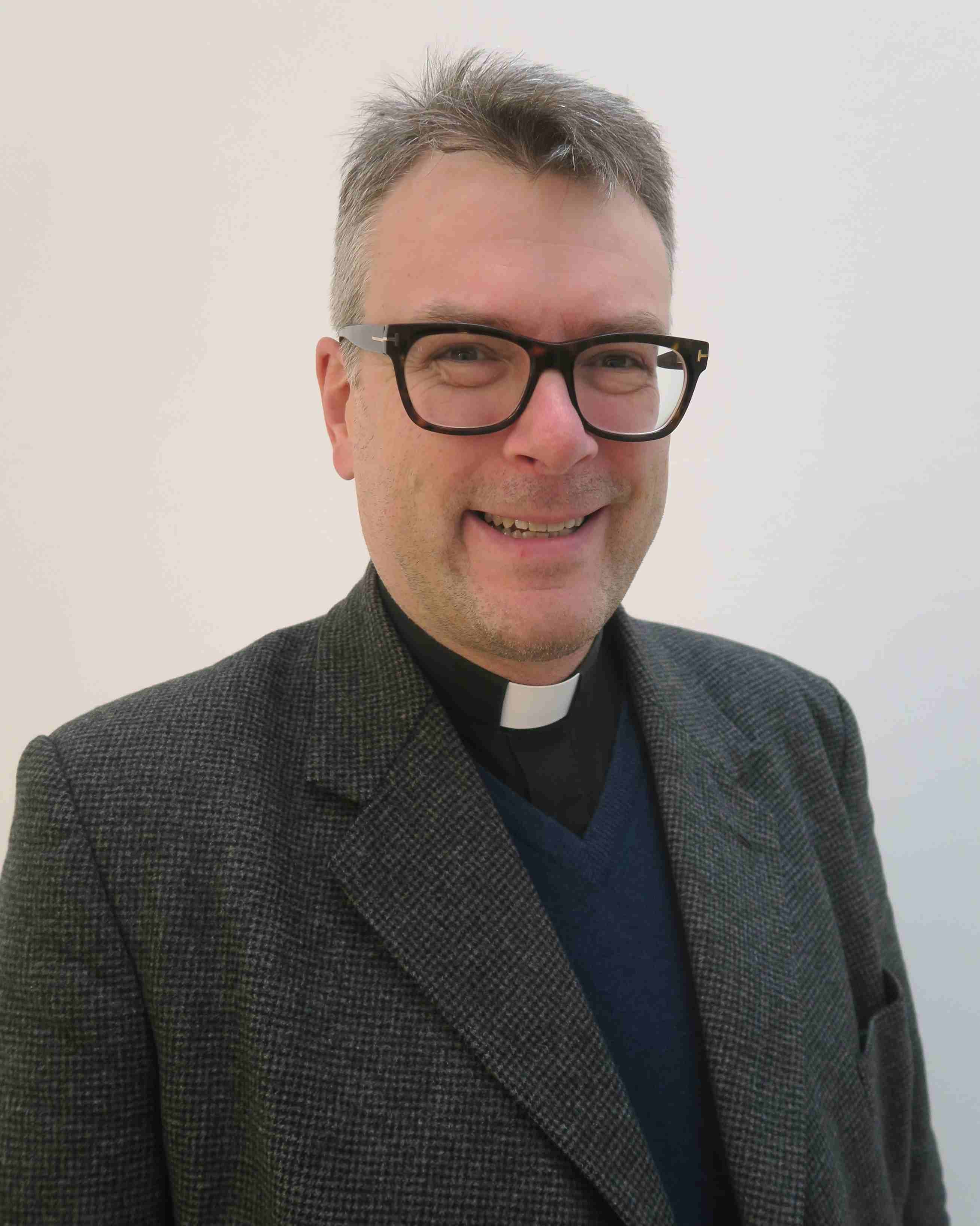 Konstantin Reymaier, 20. Oktober 2018, verbesserte Version